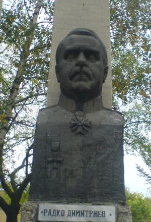 Паметник на Радко Димитриев